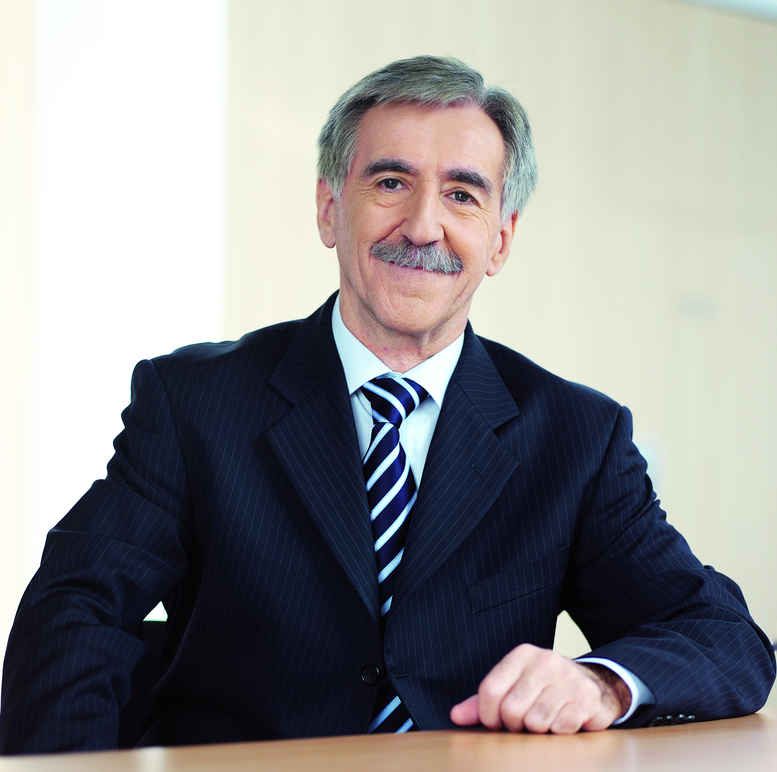 Klaus Berka, Vorstandsvorsitzender der Analytik Jena AG